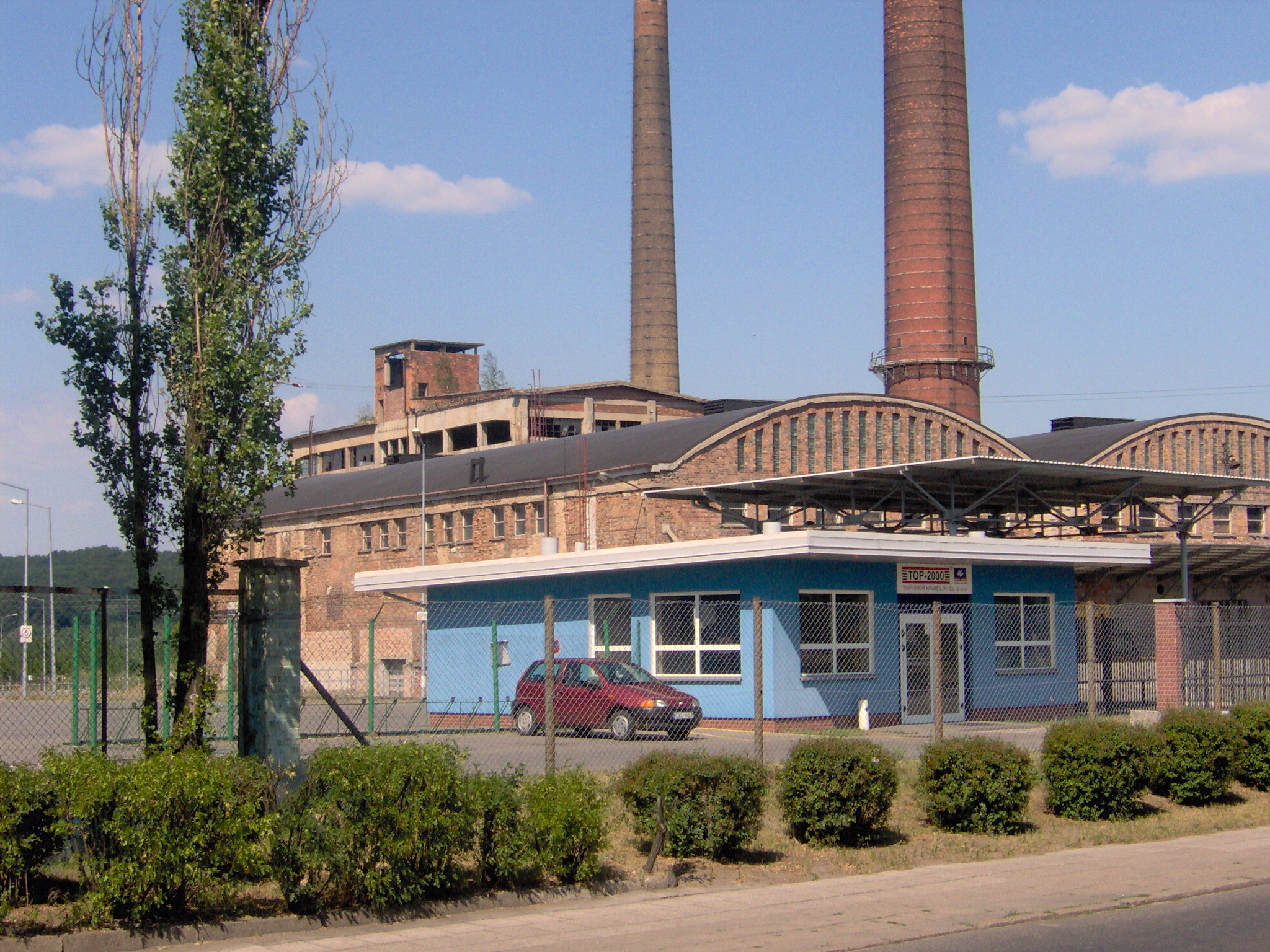 Pozostałości po celulozie (2007 r.)